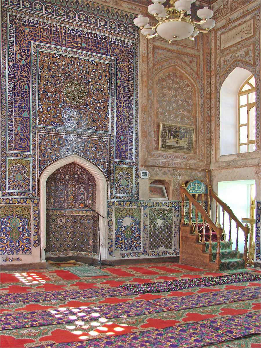 L'intérieur de la mosquée Baland (Balyand), qui est une mosquée de quartier, est une des plus belles de Boukhara. Le mihrab est orné de mosaïques polychromes, de motifs végétaux et d'inscriptions coraniques. Le plafond est suspendu à la charpente de bois. Photo Annie Dalbéra